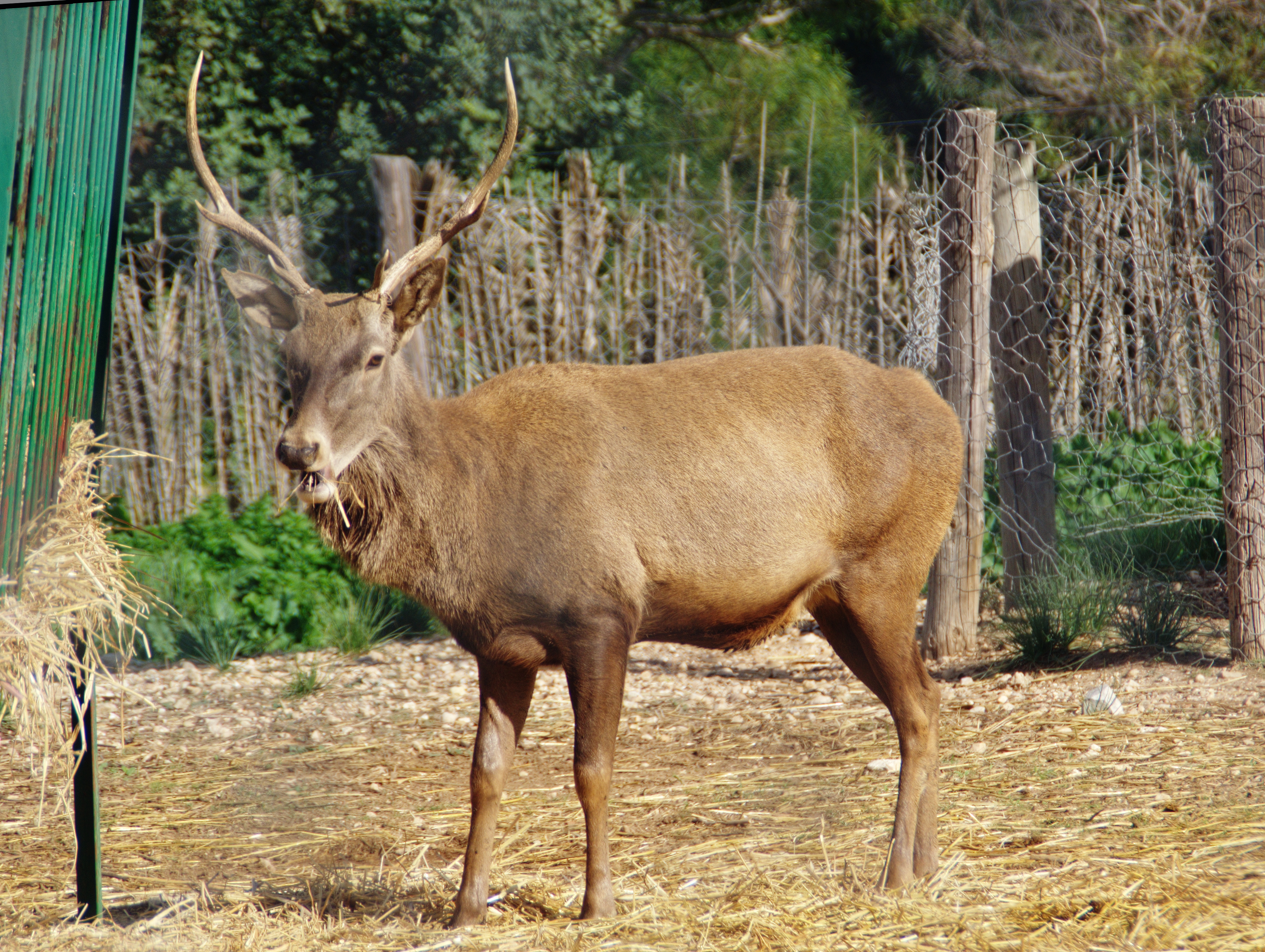 Cerf de Barbarie (Cervus elaphus barbarus) au parc animalier de Friguia en Tunisie.